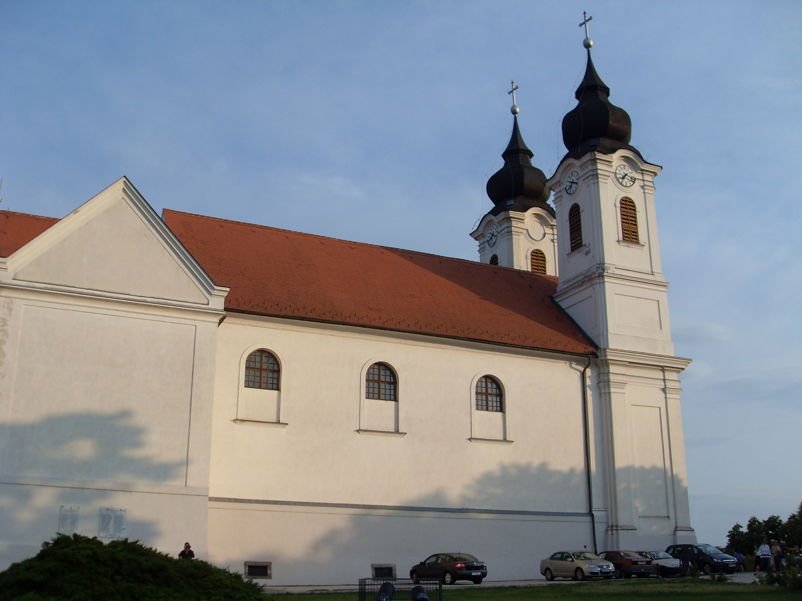 Apátsági templom (Tihany, Batthyány u. 34.) This is a photo of a monument in Hungary. Identifier: 10483